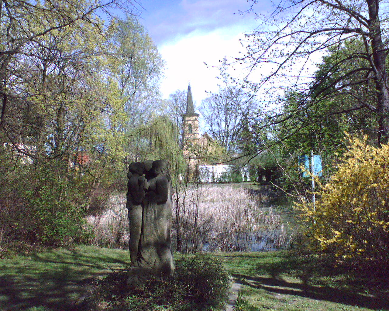 Dorfkirche Bohnsdorf, Dorfanger mit Teich